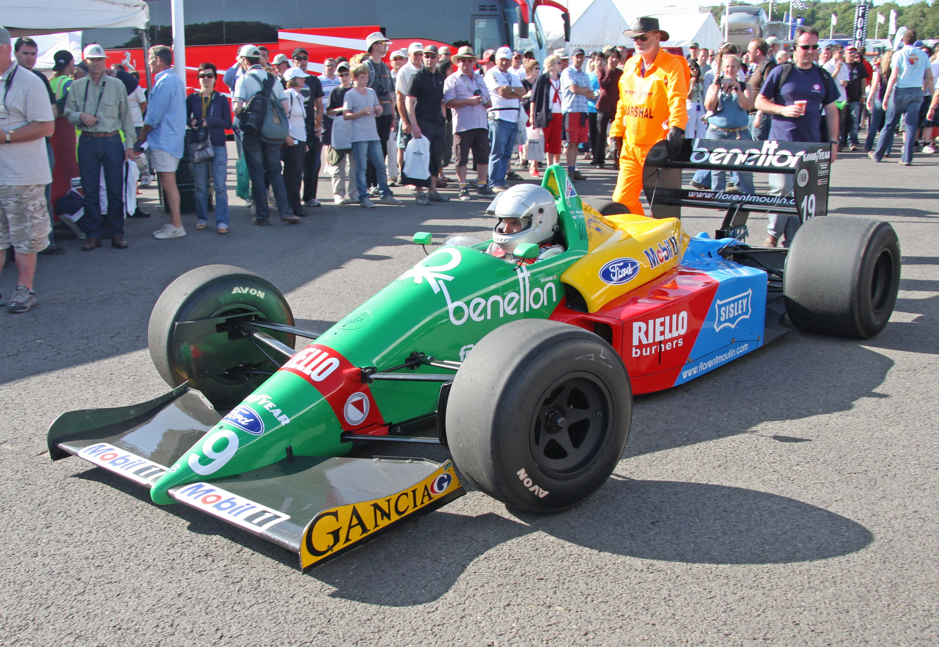 1988 Benetton-Ford B188